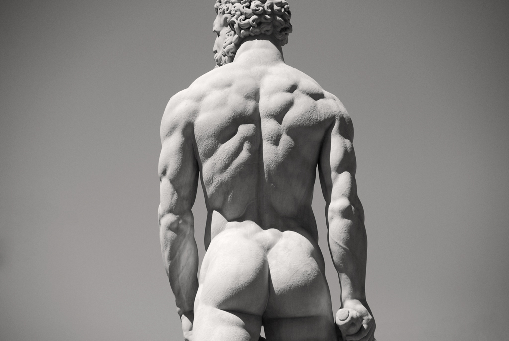 Piazza della Signoria, Florence, Italy. Statue of Heracles and Cacus (1530-1534) by Baccio Bandinelli. Detail (Hercules)